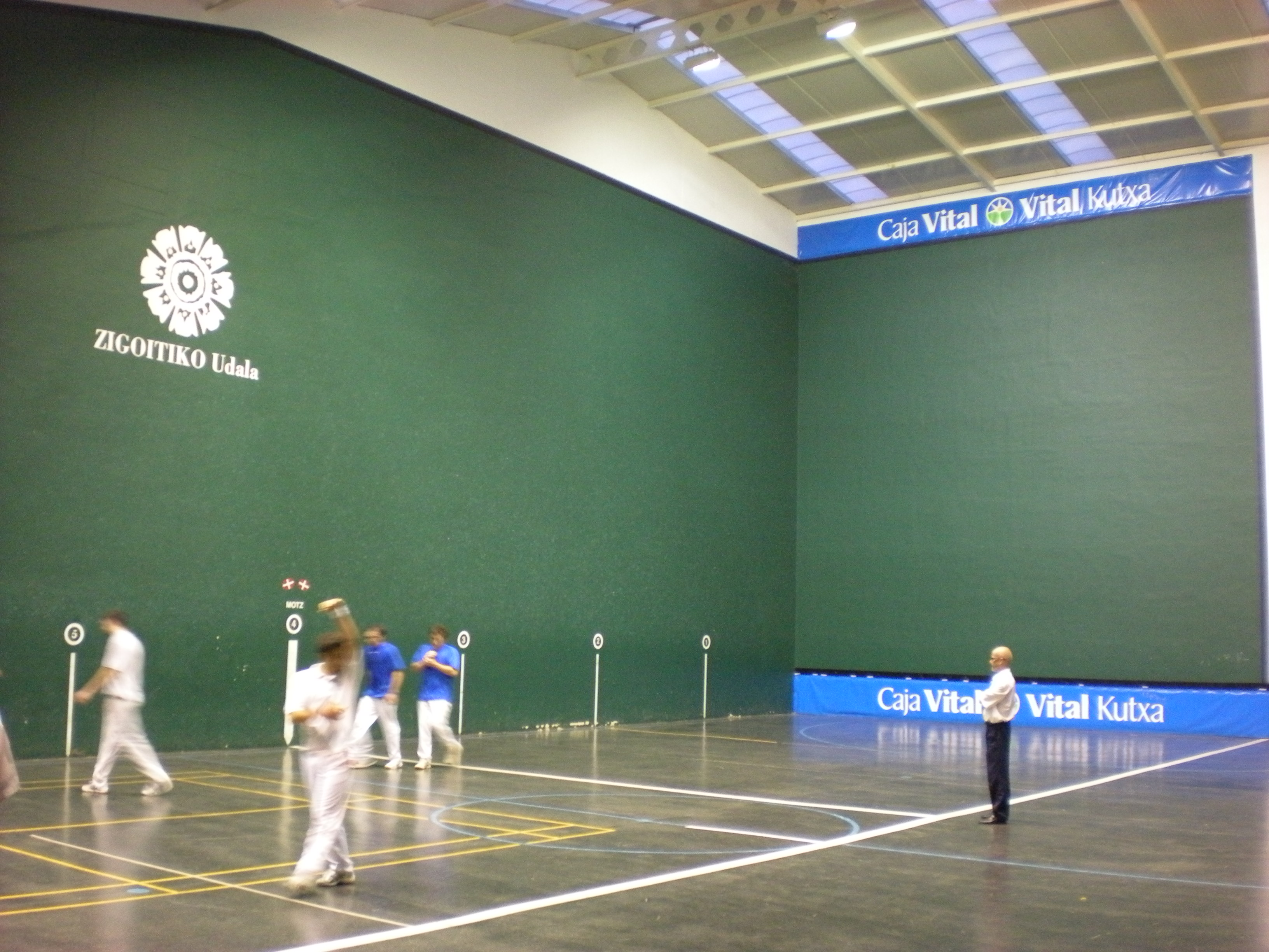 Zigoitiko udal pilotalekua, herriko jaietan, esku huskako pilota partida jokatzen ari zirela.